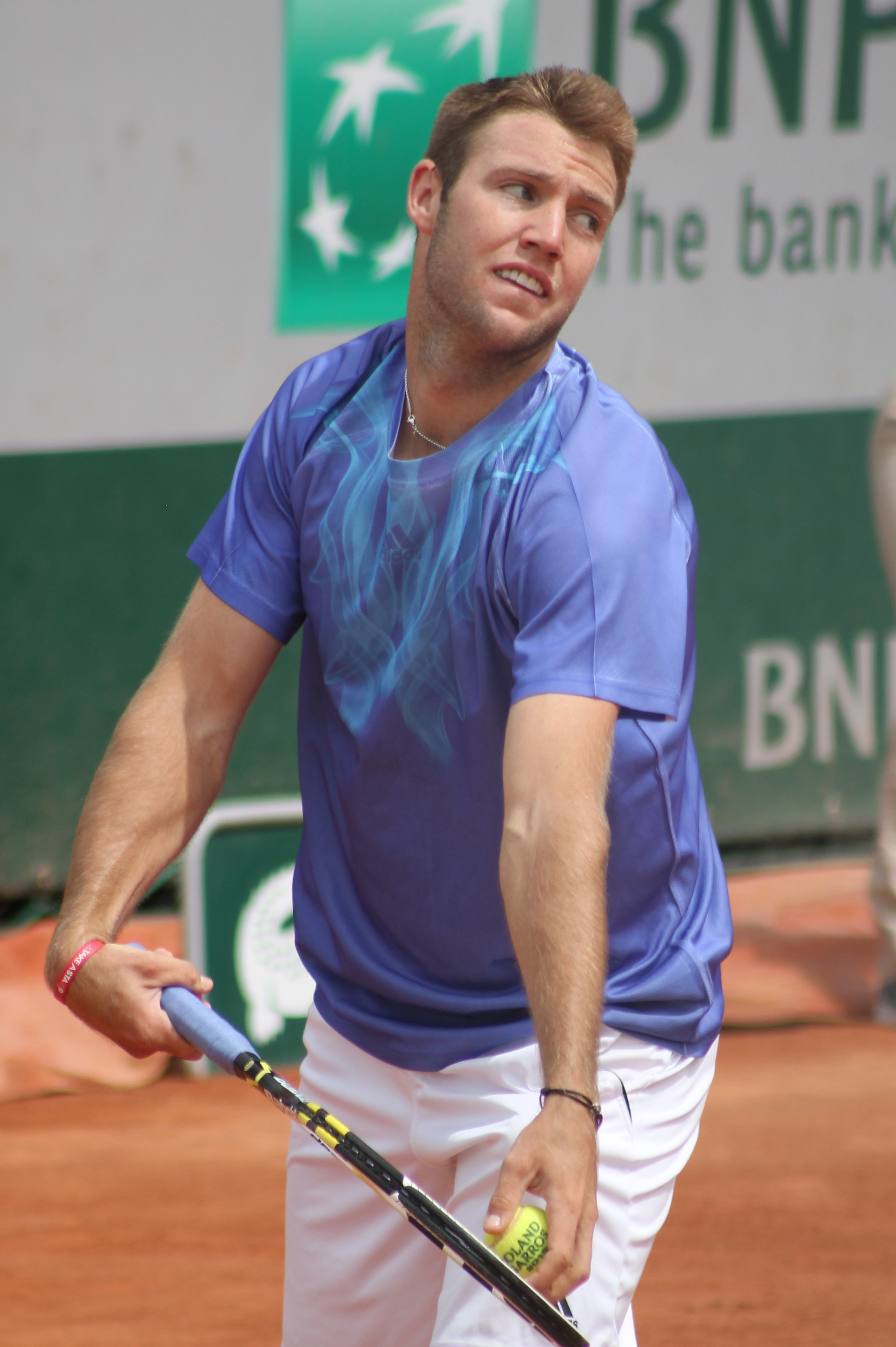 Sock RG15 (13)